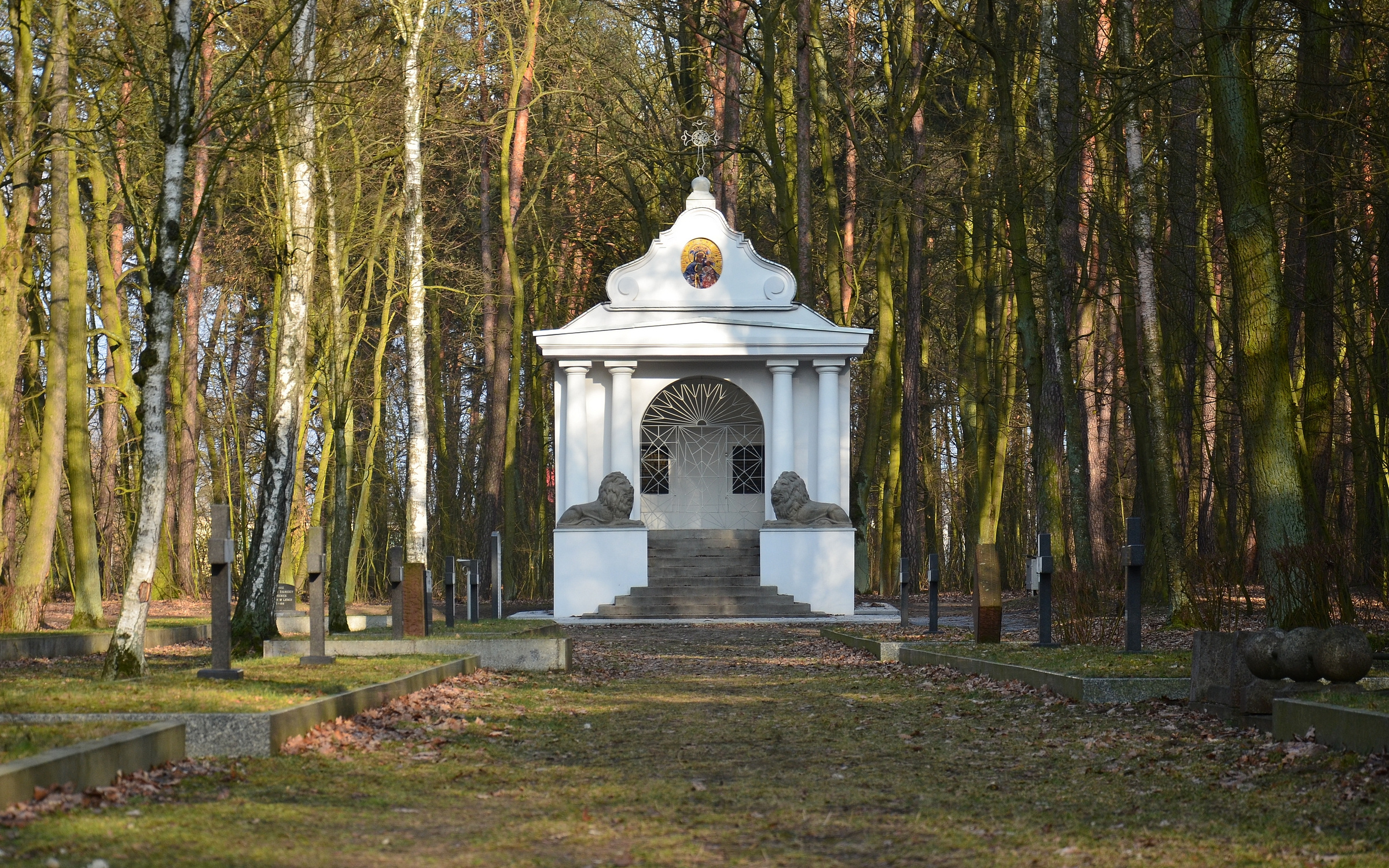 Kaplica pamięci ofiar bitwy pod Brodnicą w 1920 r.